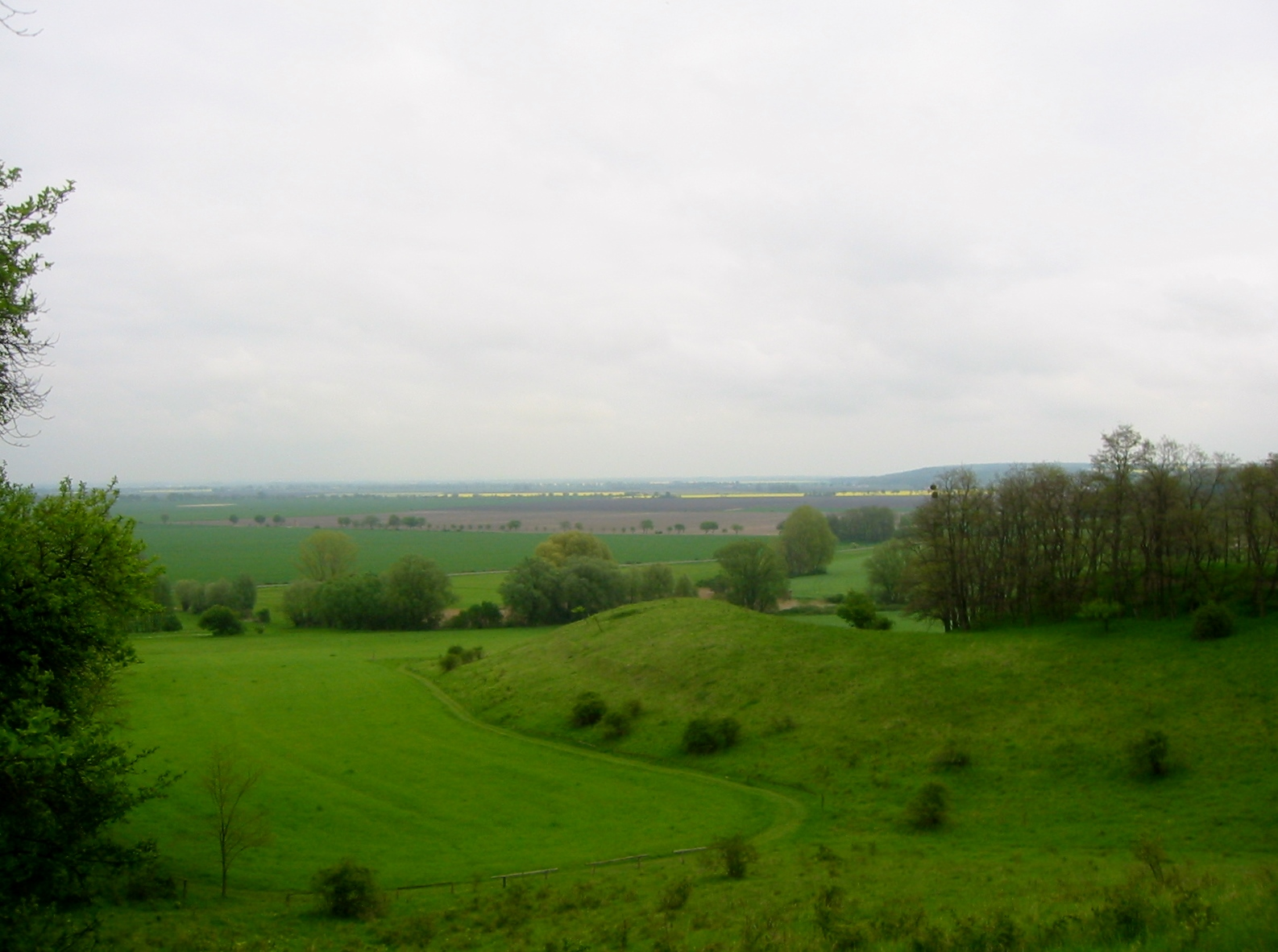 Die Oderhänge Mallnow sind ein 304 Hektar großes Naturschutzgebiet. Mallnow ist ein Ortsteil der Stadt Lebus im Landkreis Märkisch-Oderland in Brandenburg. Das Naturschutzgebiet ist u.a. für die Blüte des Adonisröschens bekannt.